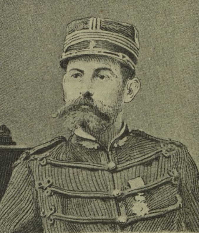 "M. le commandant Forzinetti, commandant la prison du Cherche-Midi".